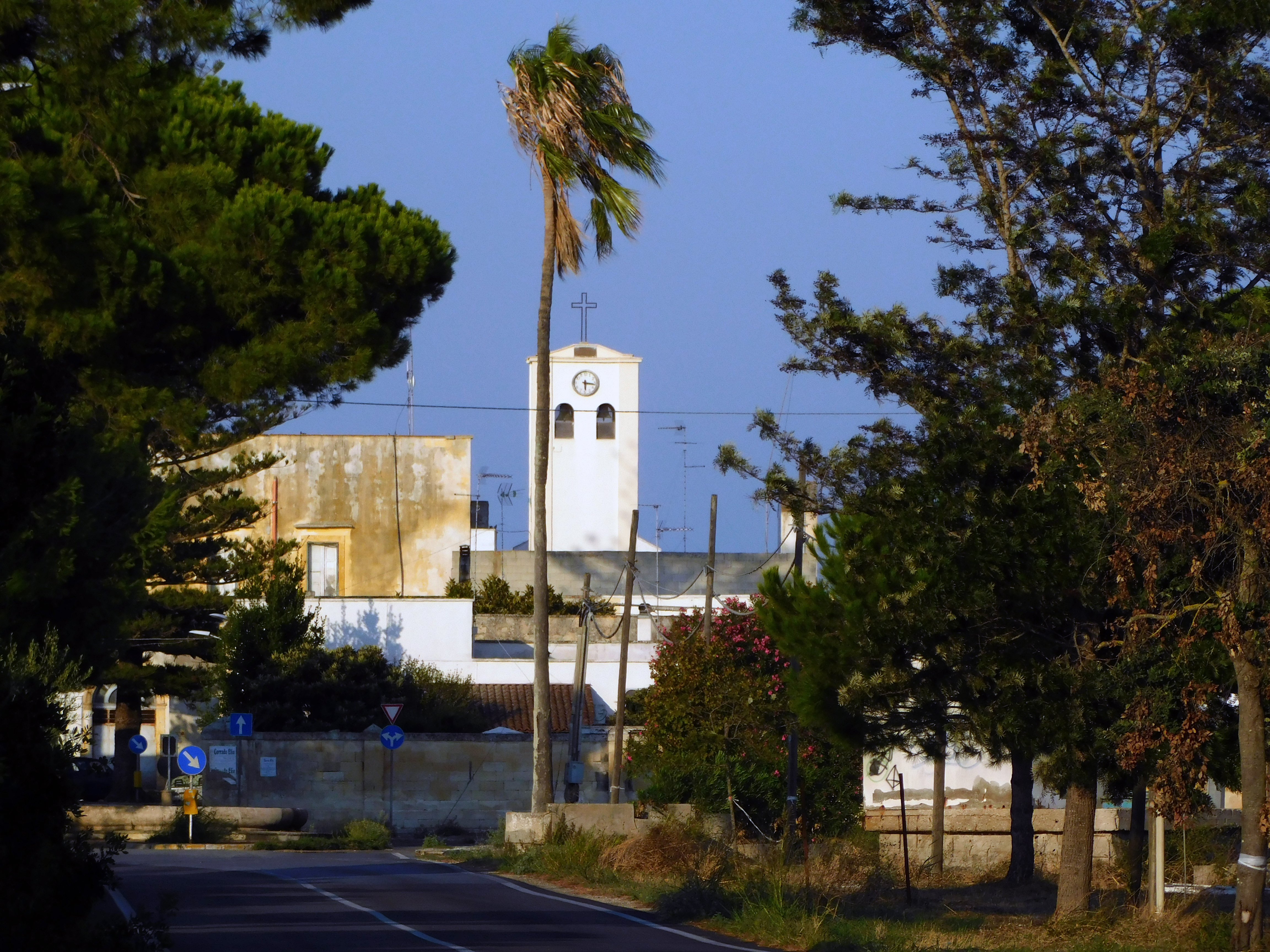 Skyline di Frigole